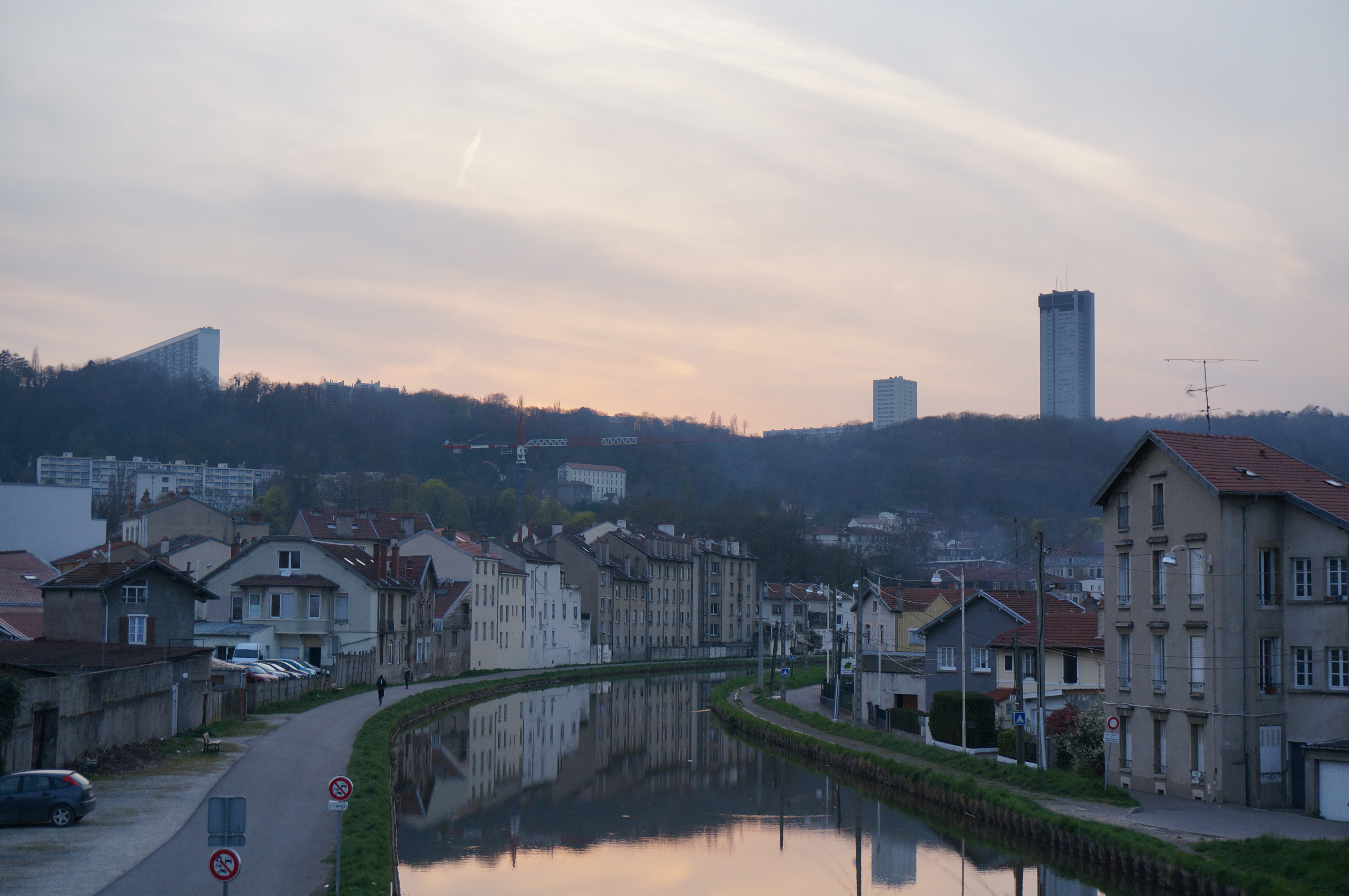 Nancy.